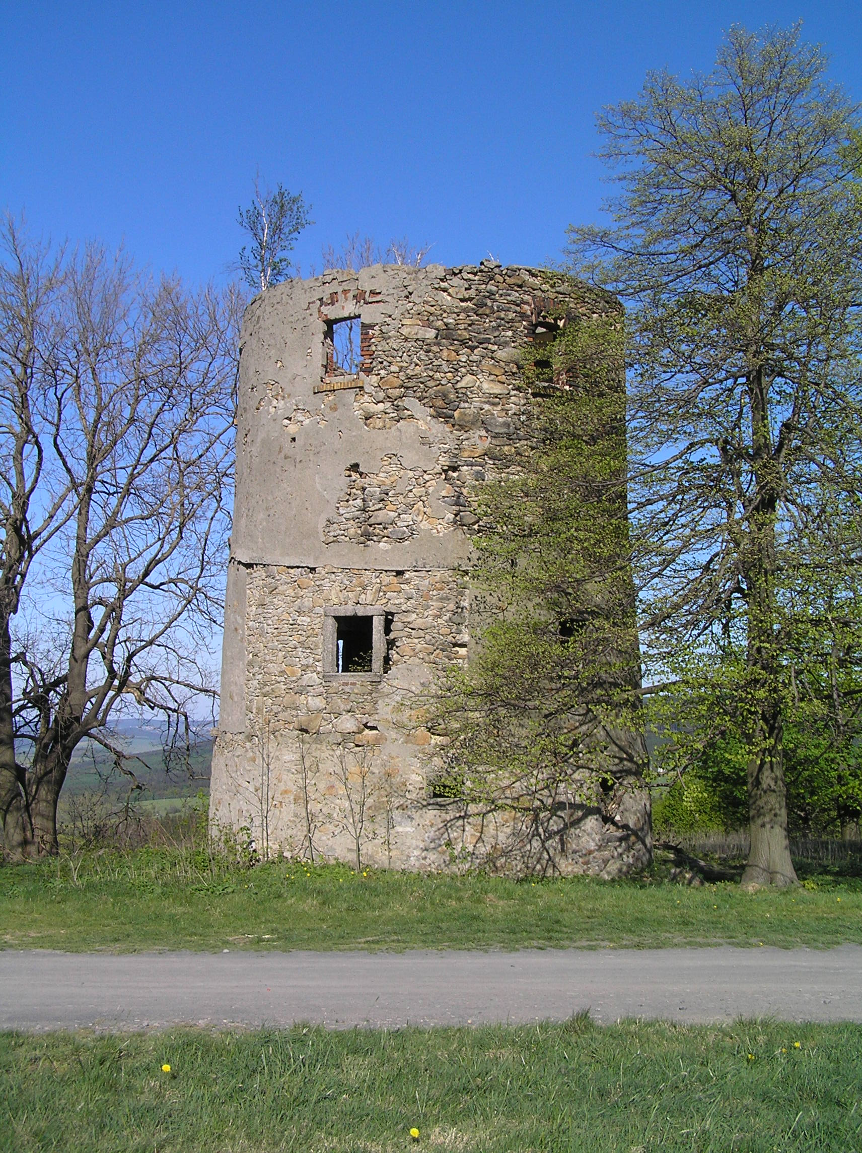 Větrný mlýn, osamocená stavba v bývalé osadě Vysoký jižně od Heřmanic, Vysoký.